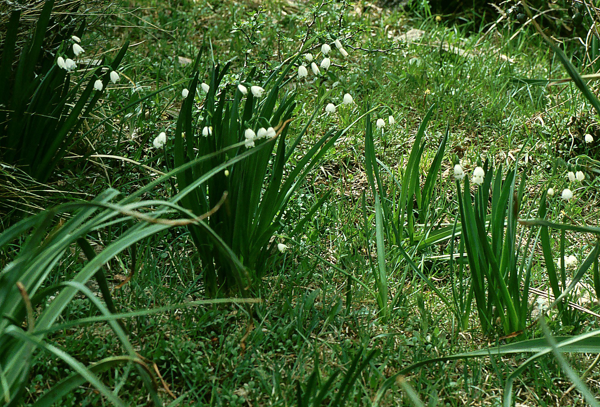 Leucojum aestivum ssp. pulchellum